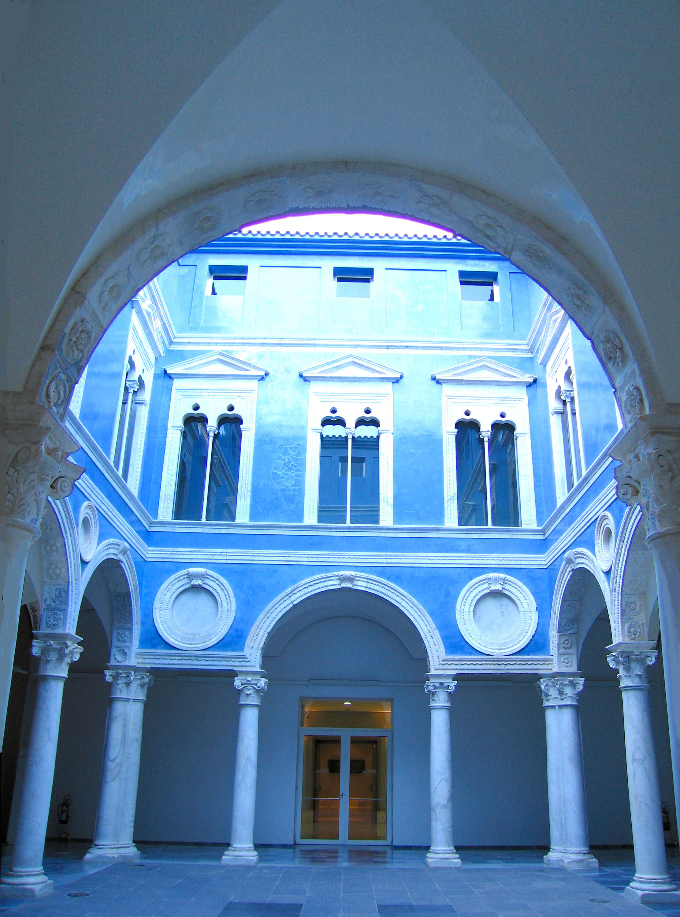 Pati de l'Amabixador Vich — València.